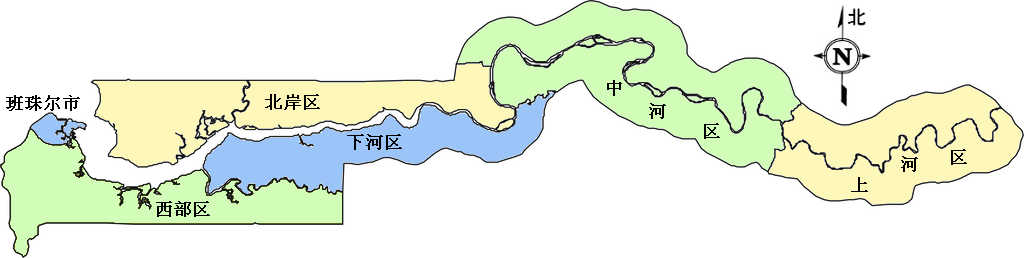 冈比亚行政区划图中文版本